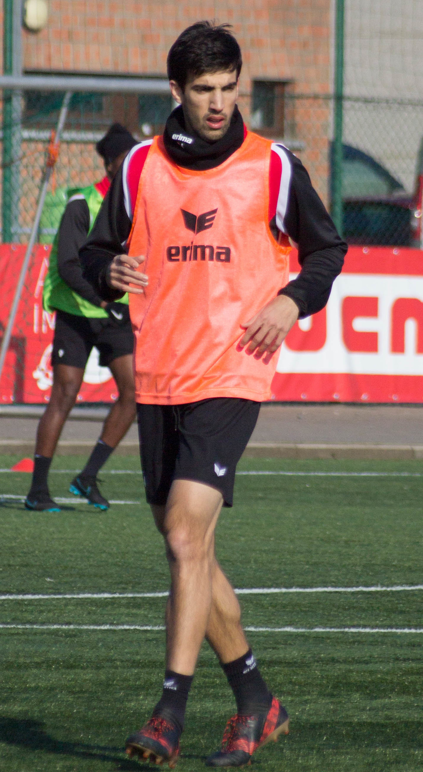 Entraînement du Royal Excel Mouscron, au Futurosport( Mouscron). Le 22 février 2018.